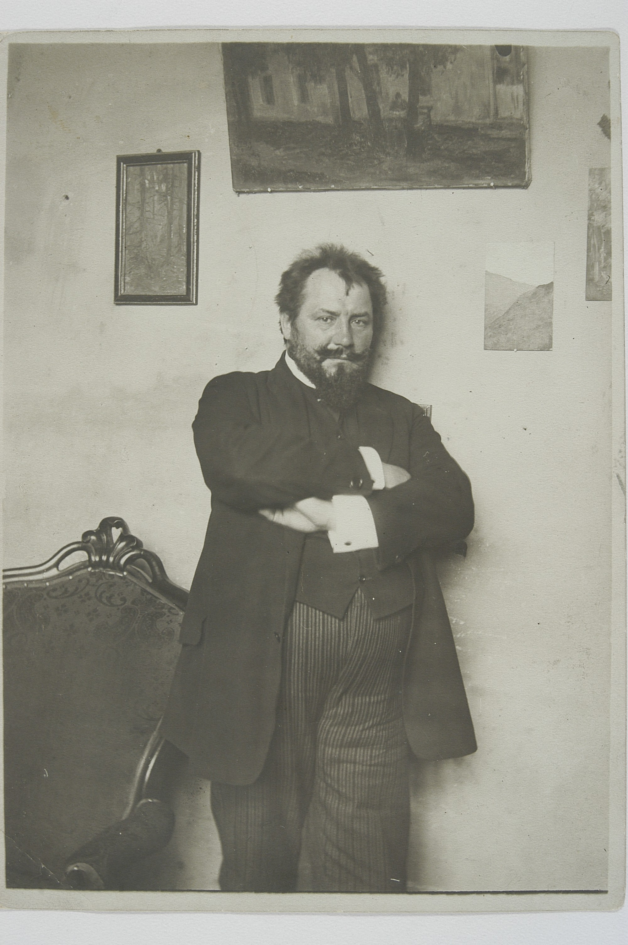 Portret Jana Kasprowicza, ok 1910 r.